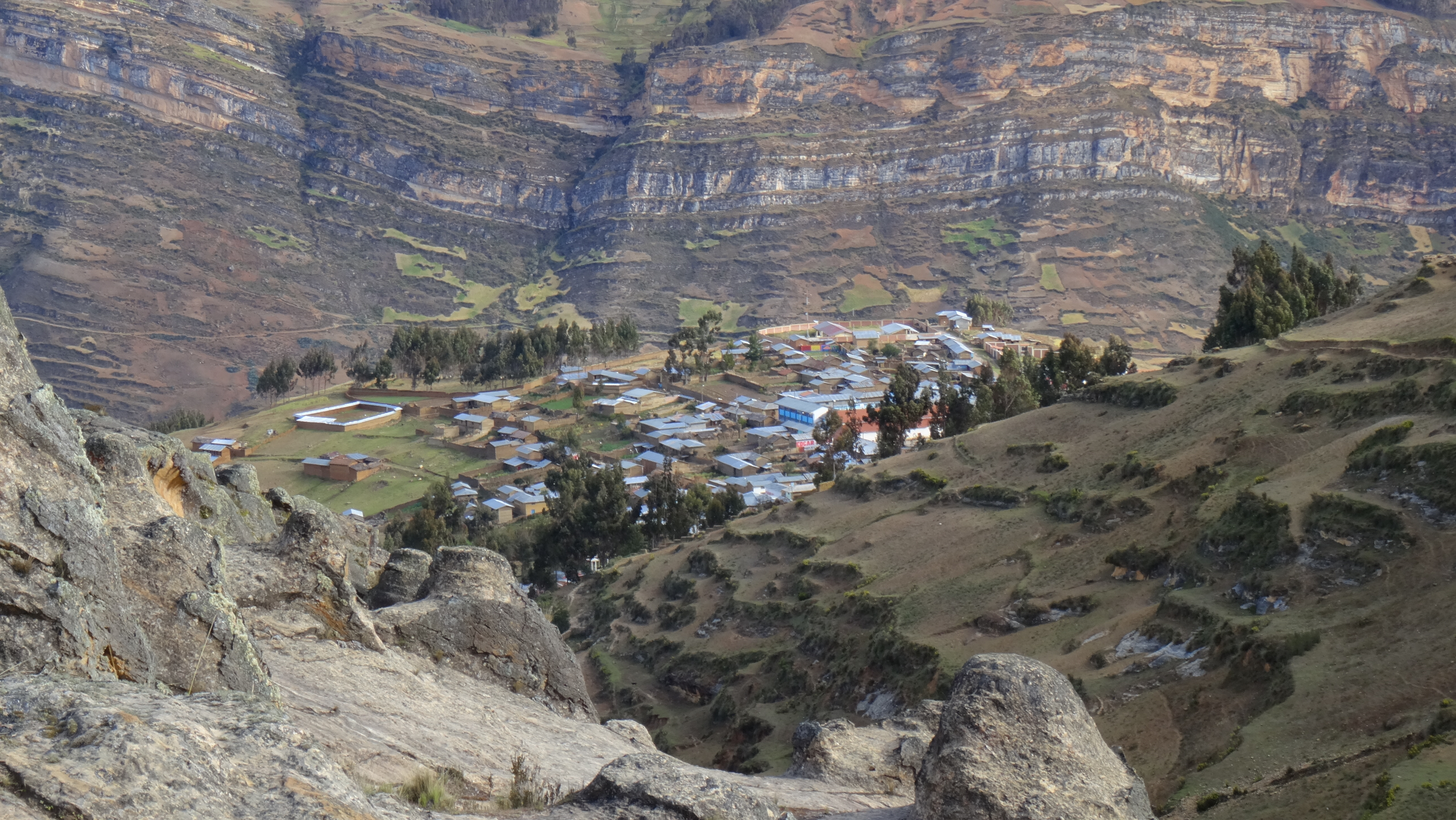 Ciudad de Miraflores, Huánuco, capital del distrito homónimo, visto desde Jatun Parara.